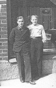 Väinö Purje ja Risto Kuorikoski. Molemmat olivat Vihdinseudun osuusliikkeen palveluksessa.